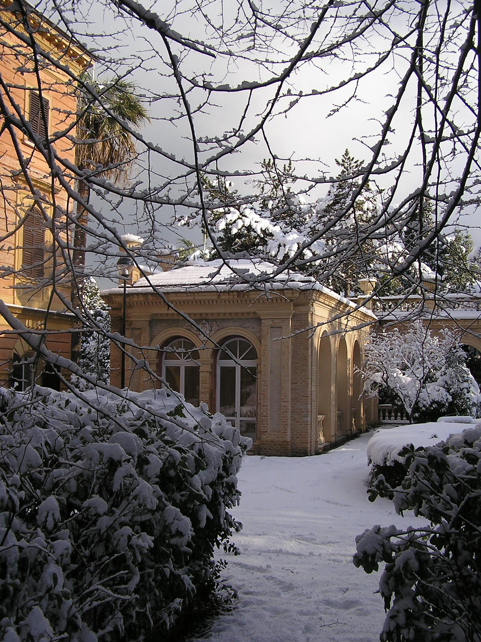 aranciera di Villa Santa Margherita durante la nevicata dell'autunno 2010